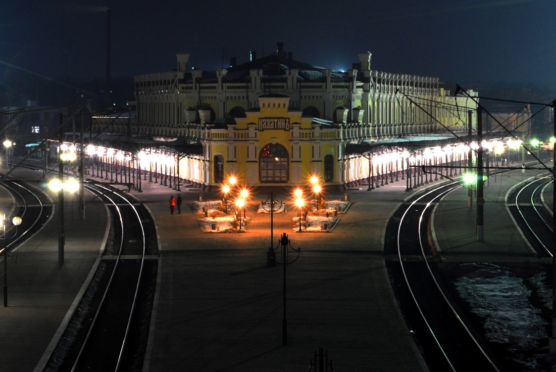 Козятинський залізничний вокзал, Козятин, вул. Вокзальна, 1